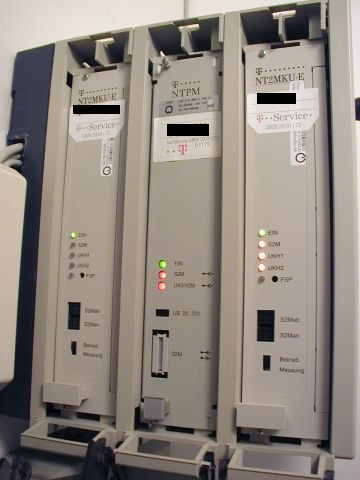 3 NTPM für Kupferanschlussleitung in einem gemeinsamen Gehäuse (Rack); der 1. von links ist in Betrieb, die anderen beiden nicht